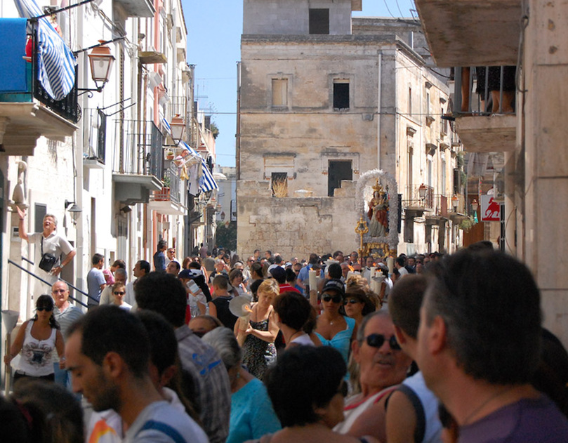 Capurso Dettagli Processione dei grandi ceri, festa della Madonna del Pozzo 08 a Capurso in provincia di Bari